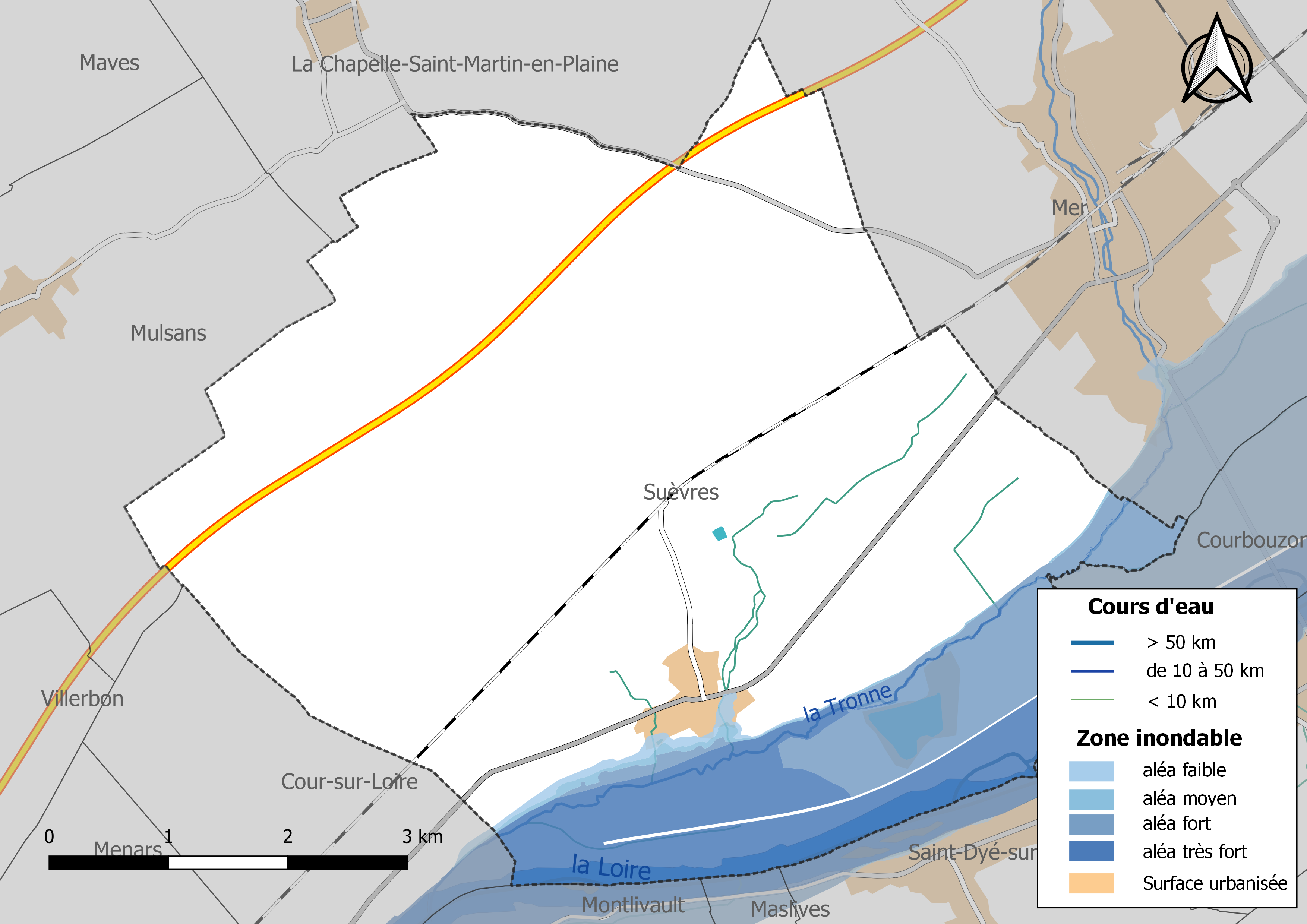 Carte des zones inondables de la commune de Suèvres (France).